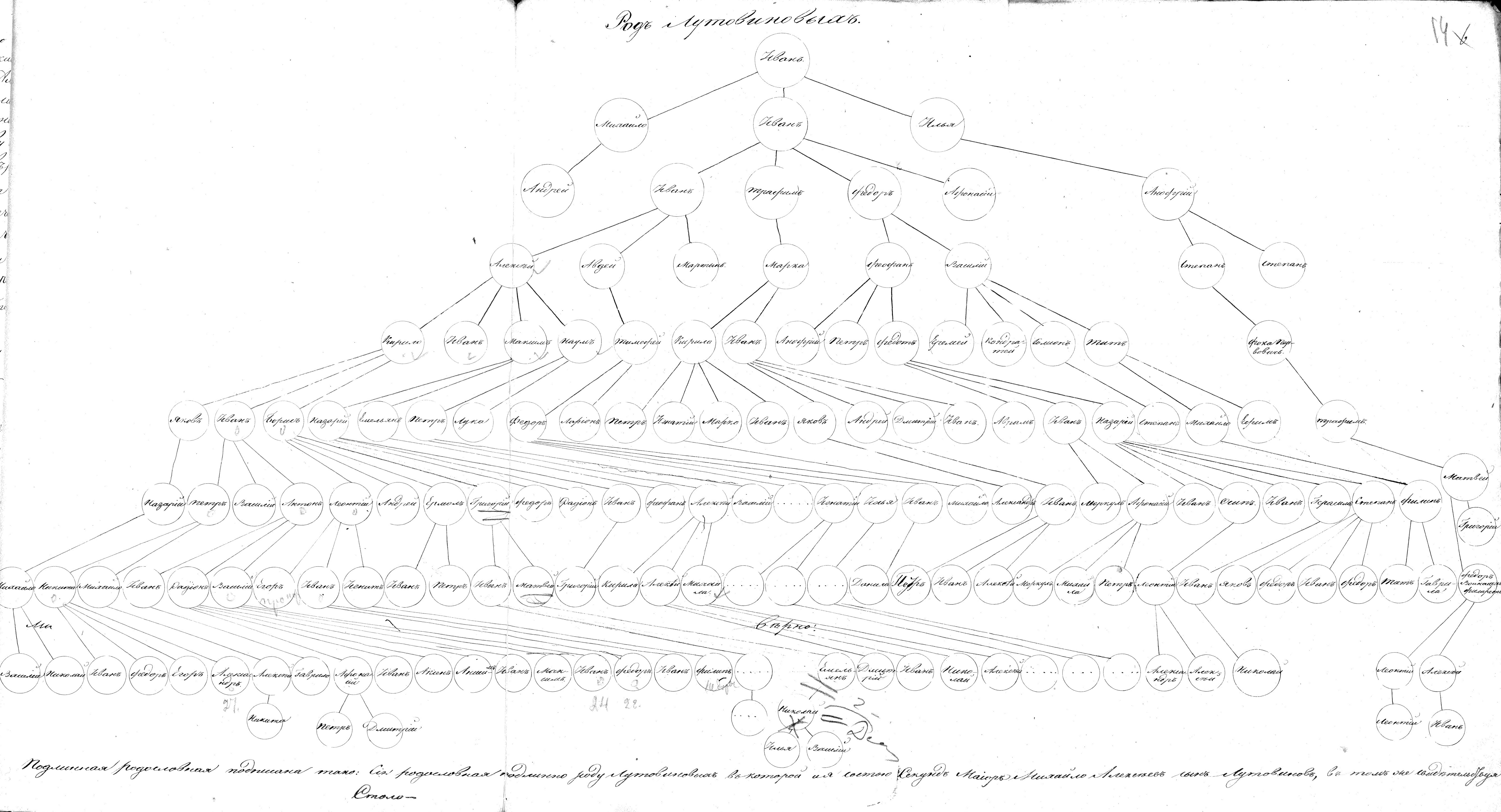 РГИА СПБ, фонд 1343, опись 24, дело 3444, лист 14